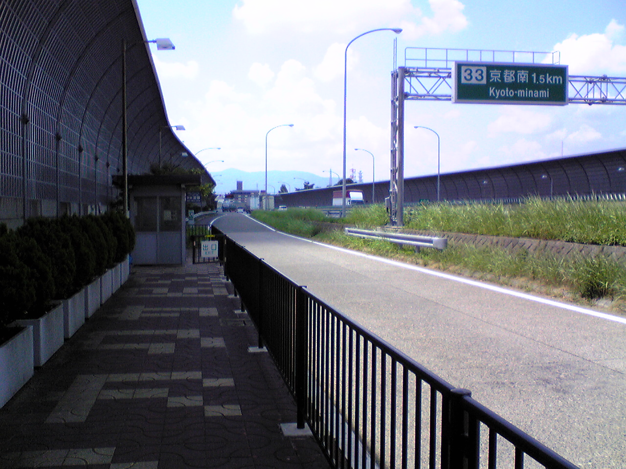 名神深草の大阪方面バス停